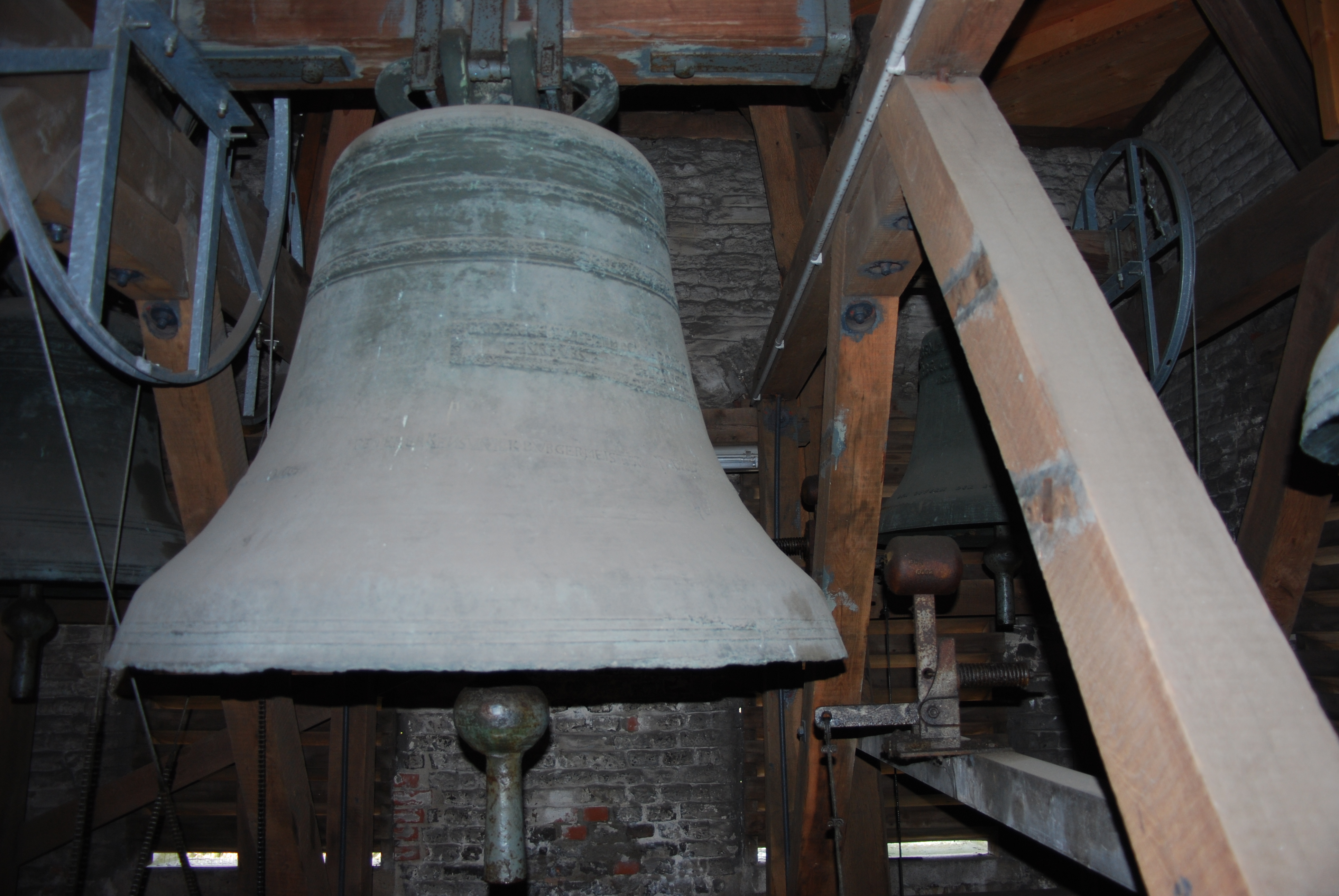 Hauptgloche des Geläut der Ev. Kirche Orsoy.